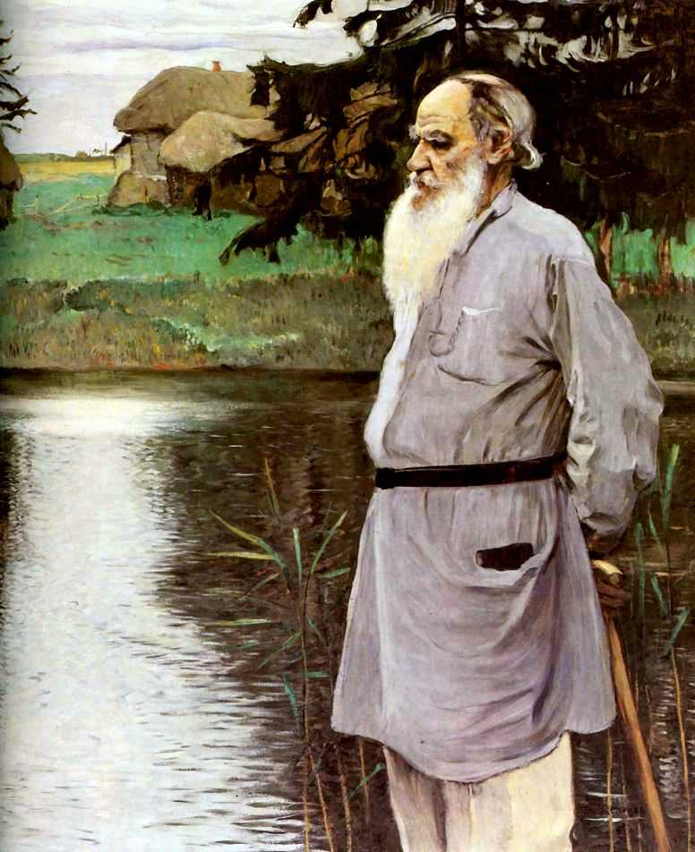 М. В. Нестеров. Л. Н. Толстой на берегу пруда в Ясной Поляне. Холст, масло. 1907